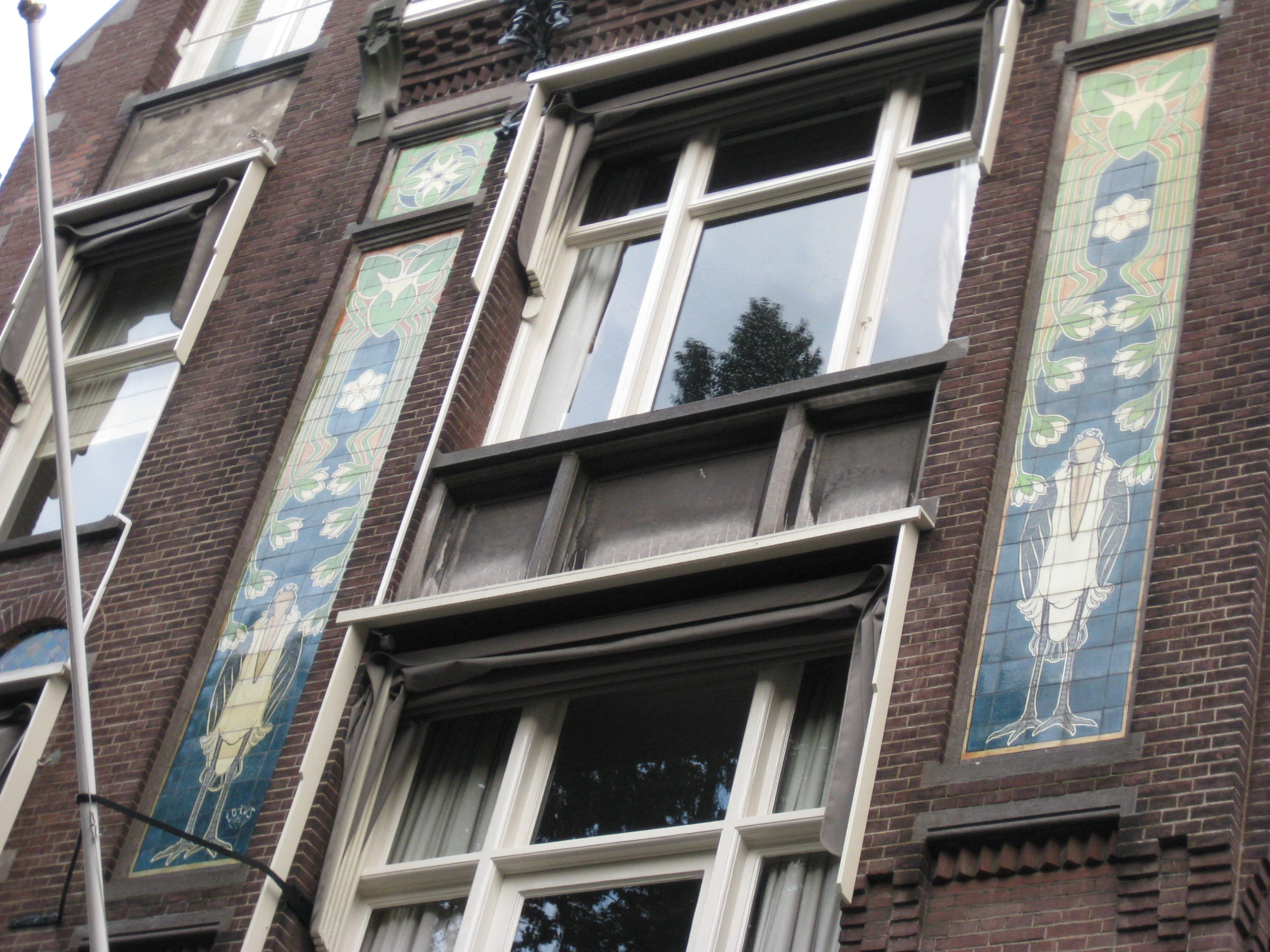 Tegeltableau op de voorgevel van Van Eeghenstraat 66, Amsterdam-Zuid